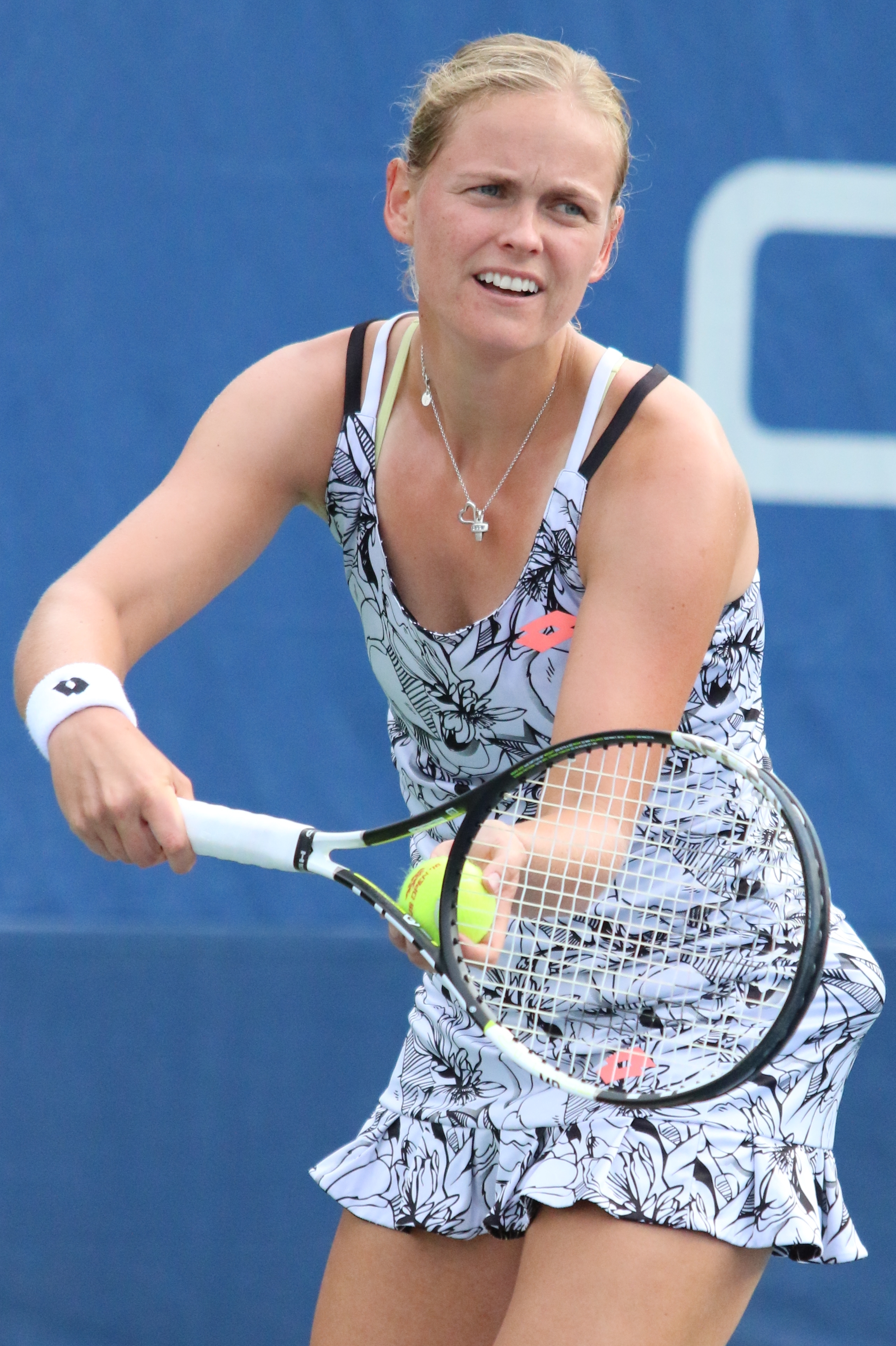 Groenefeld US16 (2)